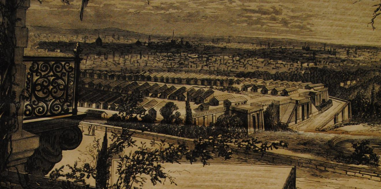 Vue de la terrasse de Meudon depuis le château-neuf durant la Commune, 1870.